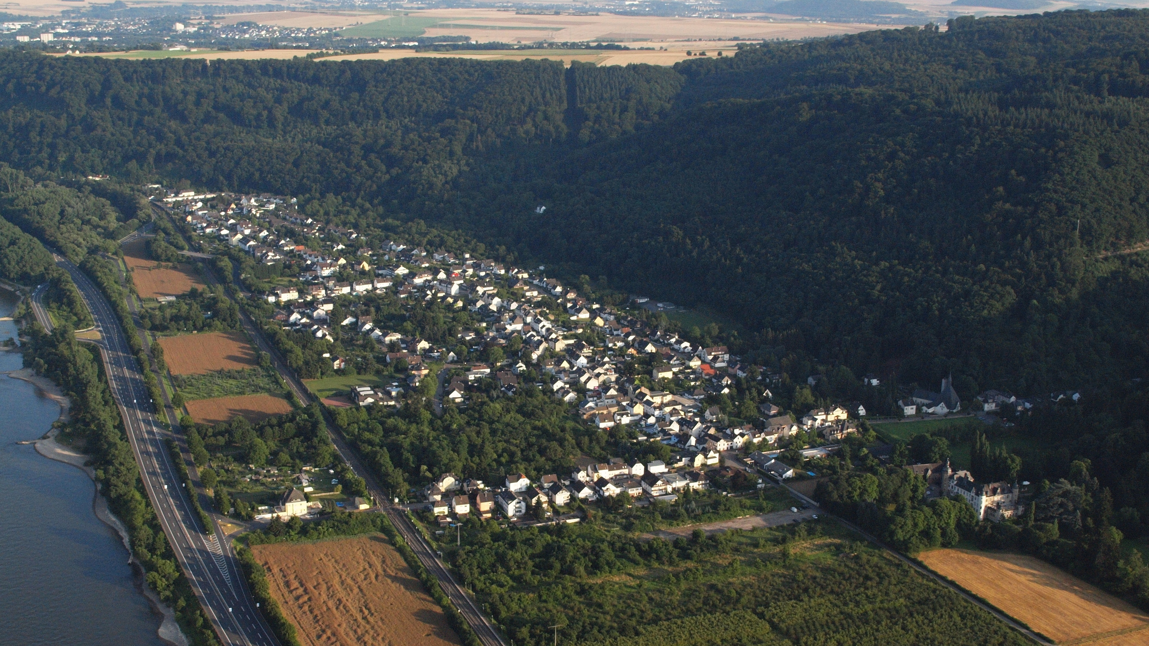 Namedy, Andernach: Luftaufnahme aus nördlicher Richtung